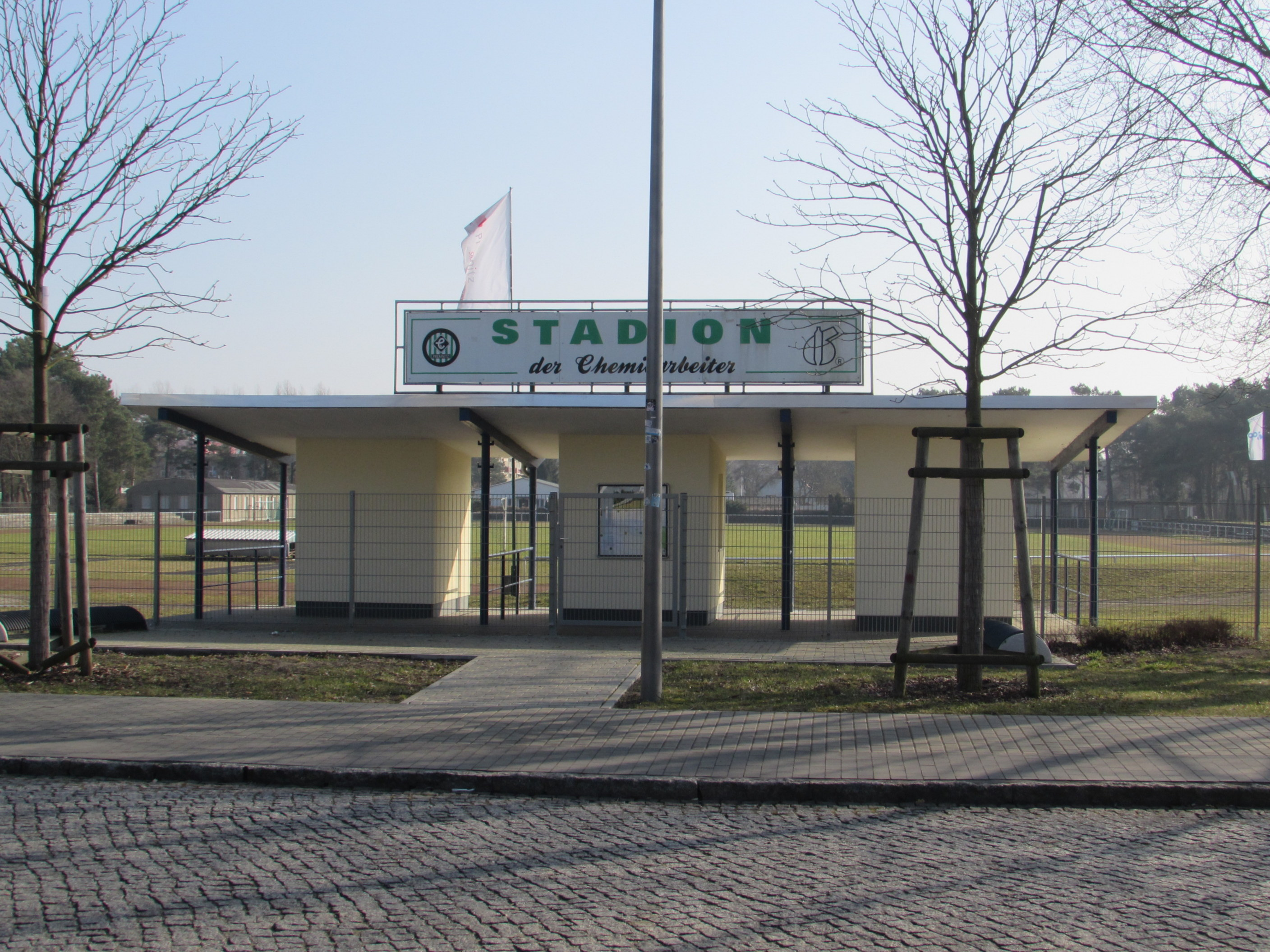 eingang stadion der chemiearbeiter premnitz